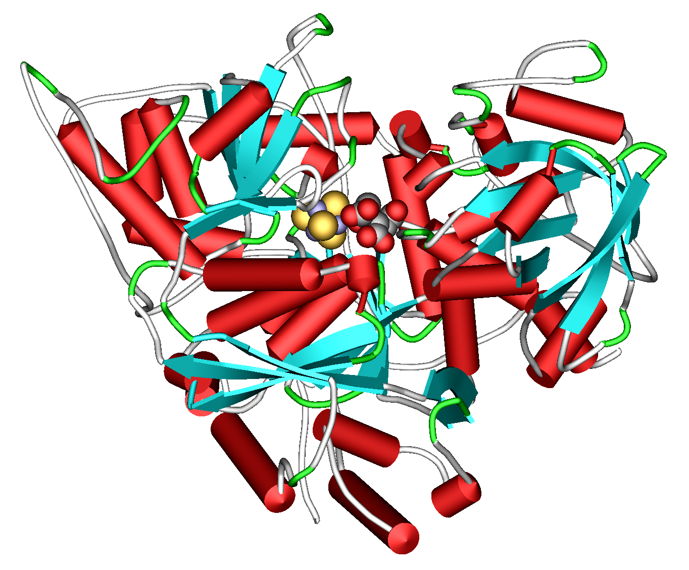 Tertiärstruktur der Aconitase mit gebundenem alpha-Methylisocitrat. Aconitase des Rinds; Abbildung erstellt aus pdb 1AMI ( mit pymol 0.99 ; zweite Version.